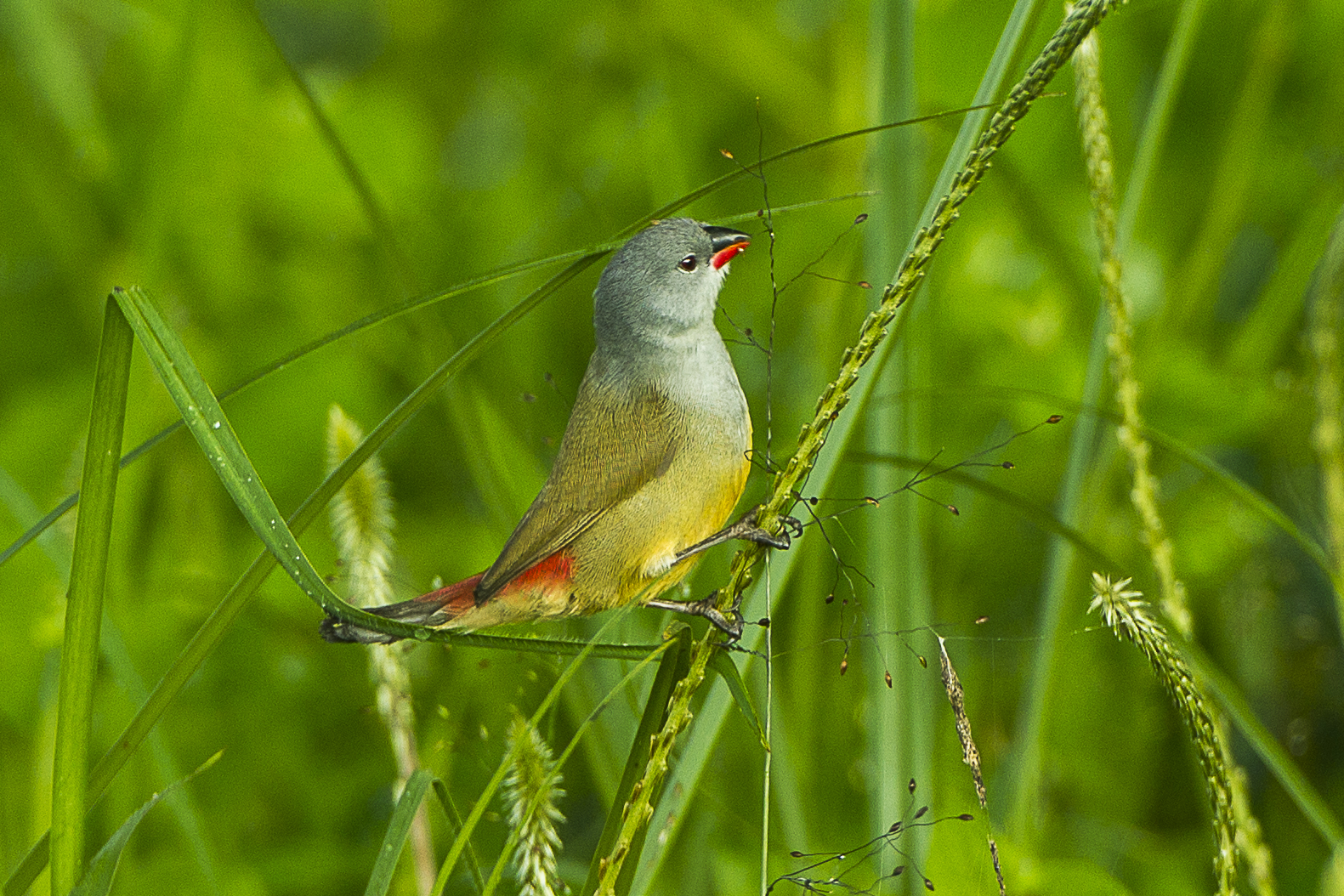 Yellow-bellied Waxbill - Mt.Kenya NP - Kenya_S4E7308